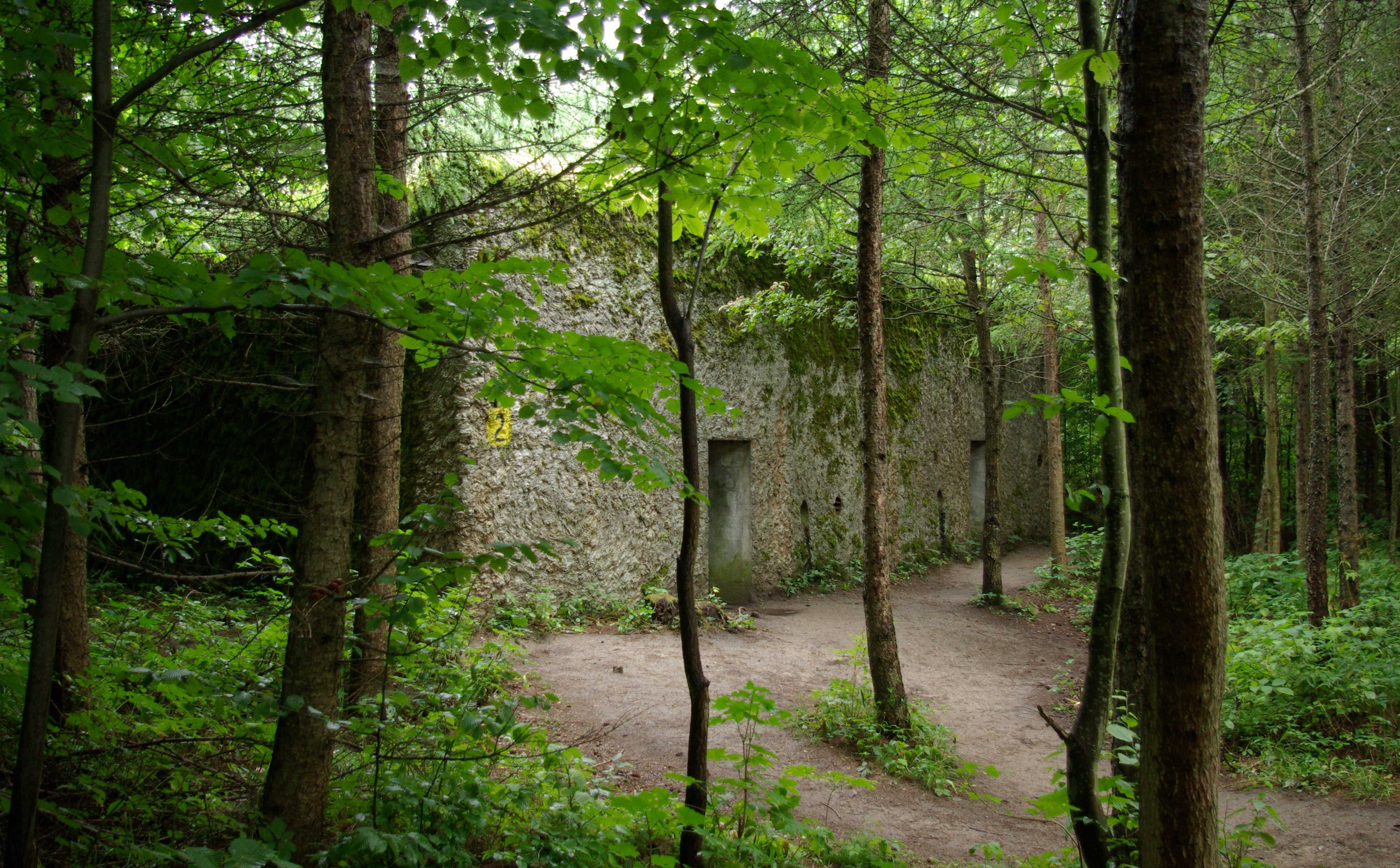 Kwatera Naczelnego Dowództwa Wojsk Lądowych (OKH) w Mamerkach